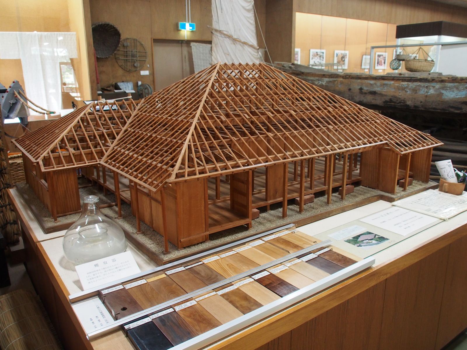 宮良殿内の骨組模型（八重山博物館蔵）